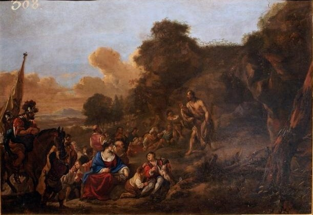 San Juan Bautista predicando en el desierto, óleo sobre cobre, 59,50 x 84,50 cm, Museo de Guadalajara